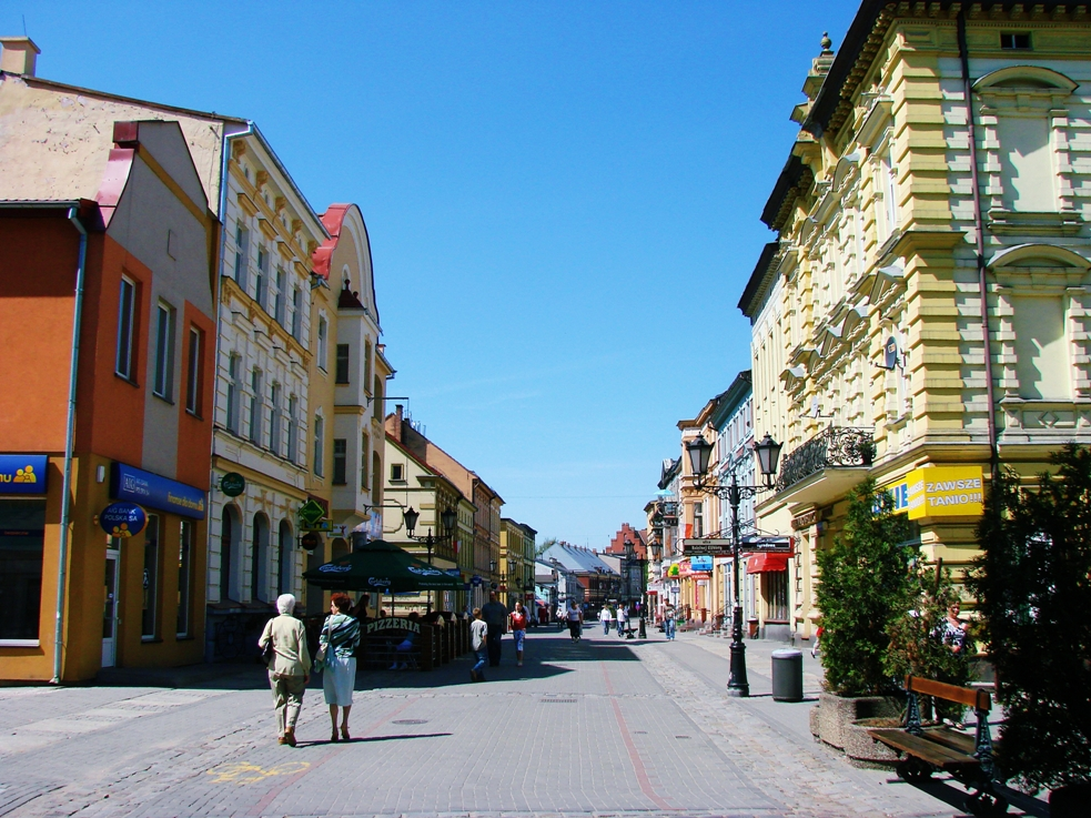 Szczecinek, ul. Bohaterów Warszawy